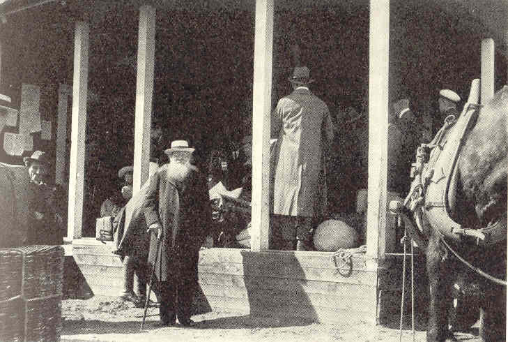 Peter Kropotkin passes through Haparanda in 1917. There are a number of classic pictures of russian revolutionaries in Sweden. One of the oldest is from when Michail Bakunin visited Stockholm in the 1860s and the most known is probably from Lenin's visit in Stockholm 1917. For those, the photographers are known, but not for this picture. It is probably taken by a local photographer in Haparanda since it was published on page 39 in the city of Haparanda's 100th jubilee yearbook published three years after the city turned 100 years in 1942. ("Haparanda stad 100 år", by R. Odencrants, printed in Uppsala 1945). Peter Kropotkin passerar Haparanda 1917. Det finns ett antal klassiska bilder på ryska revolutionärer i Sverige, en av de äldsta är när Michail Bakunin besöker Stockholm på 1860-talet och den kanske mest kända är Lenins snabbesök i Stockholm år 1917, där är fotograferna kända, men med denna bild är det inte så och jag tror att det är en lokal fotograf i Haparanda som har tagit den, för den finns med på sidan 39 i Haparanda stads 100 års jubileumsbok, vilken utkom tre år efter att staden fyllde 100 år 1942. ("Haparanda stad 100 år", förf. av R. Odencrants, tryckt i Uppsala 1945 på uppdrag av Haparanda stad.). Odencrants lämnar inga utförligare uppgifter om enskilda bildobjekt.